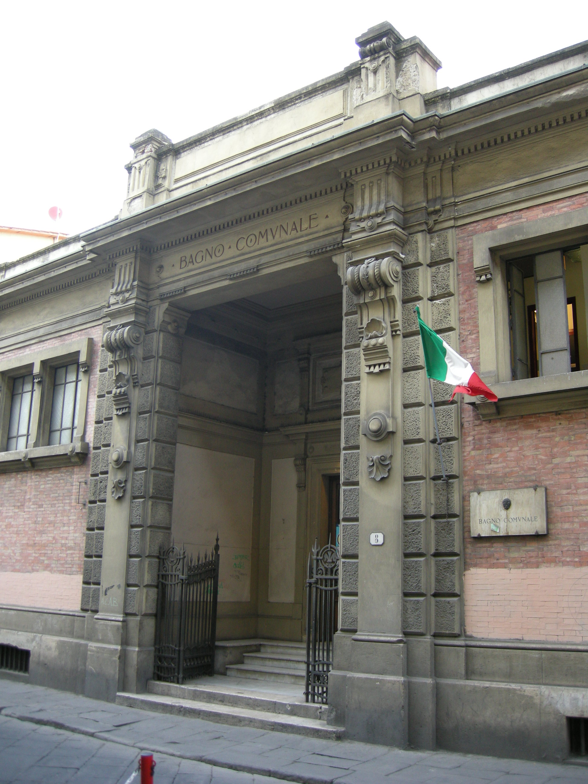 Bagni pubblici firenze